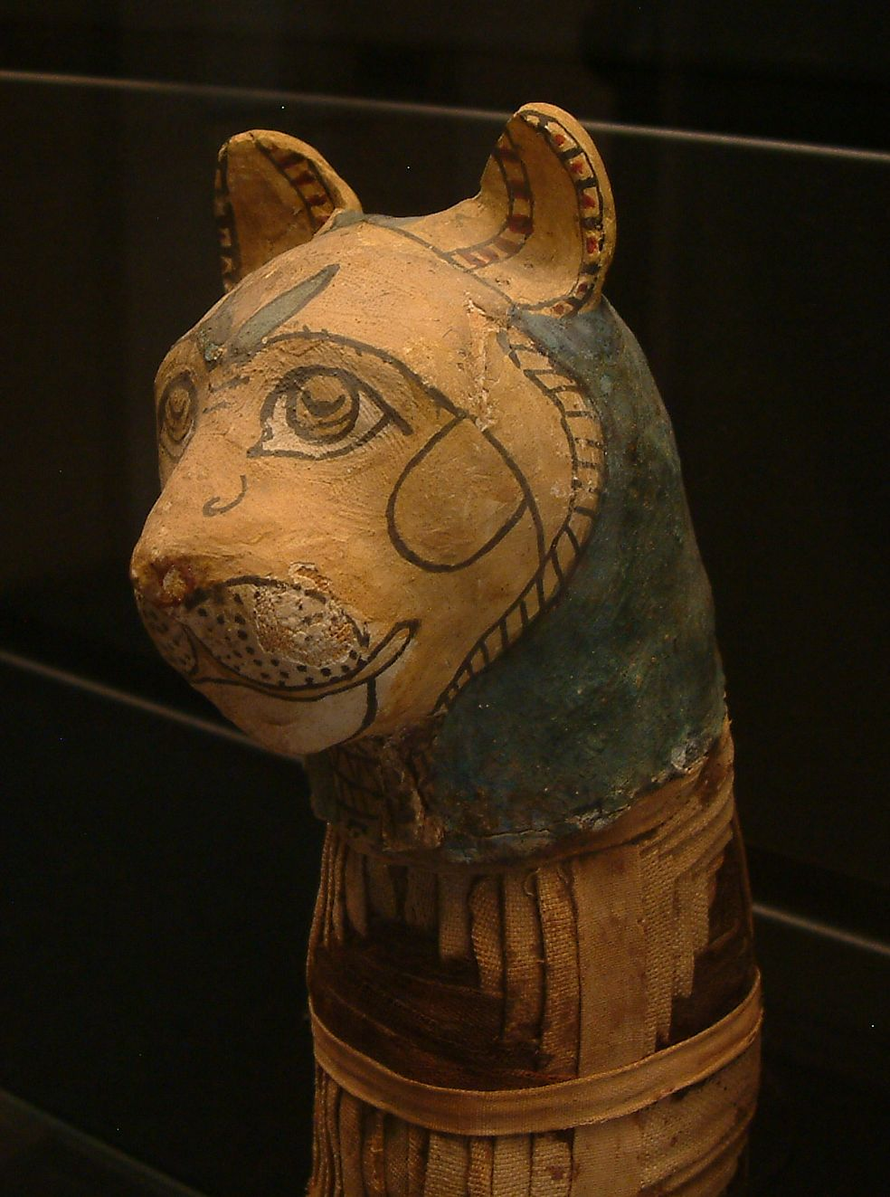 Momie de chat.